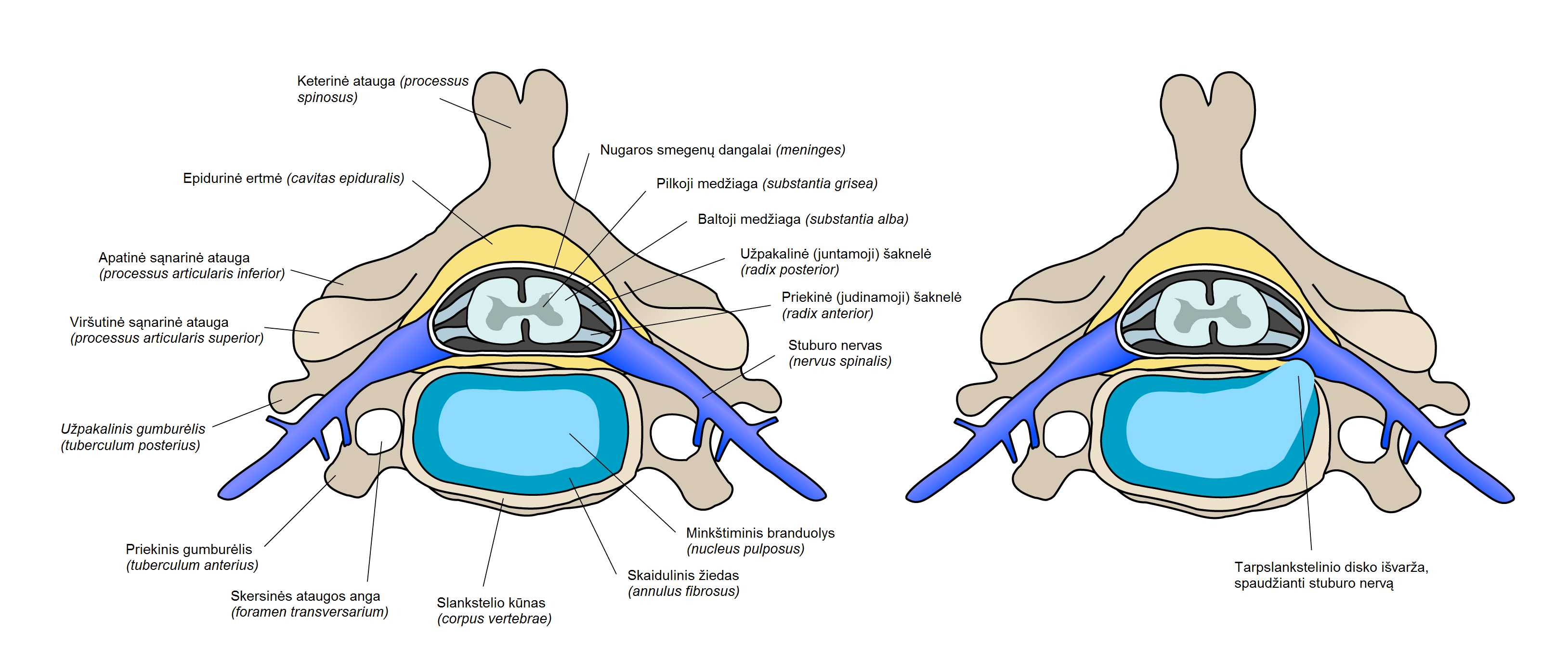 Kairėje - stuburo slankstelio ir tarpslankstelinio disko sandara; dešinėje - išvaržos susiformavimas.